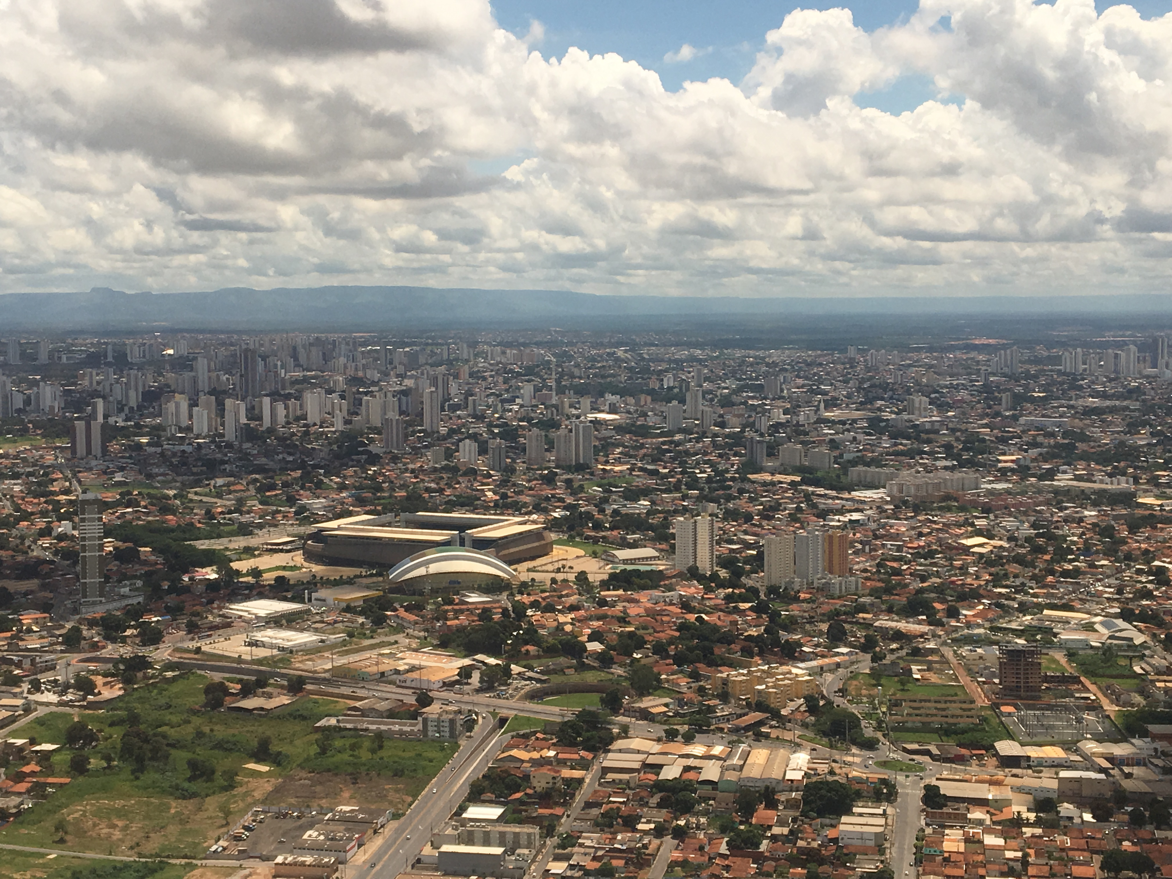 Imagem aérea de Cuiabá, no Mato Grosso.